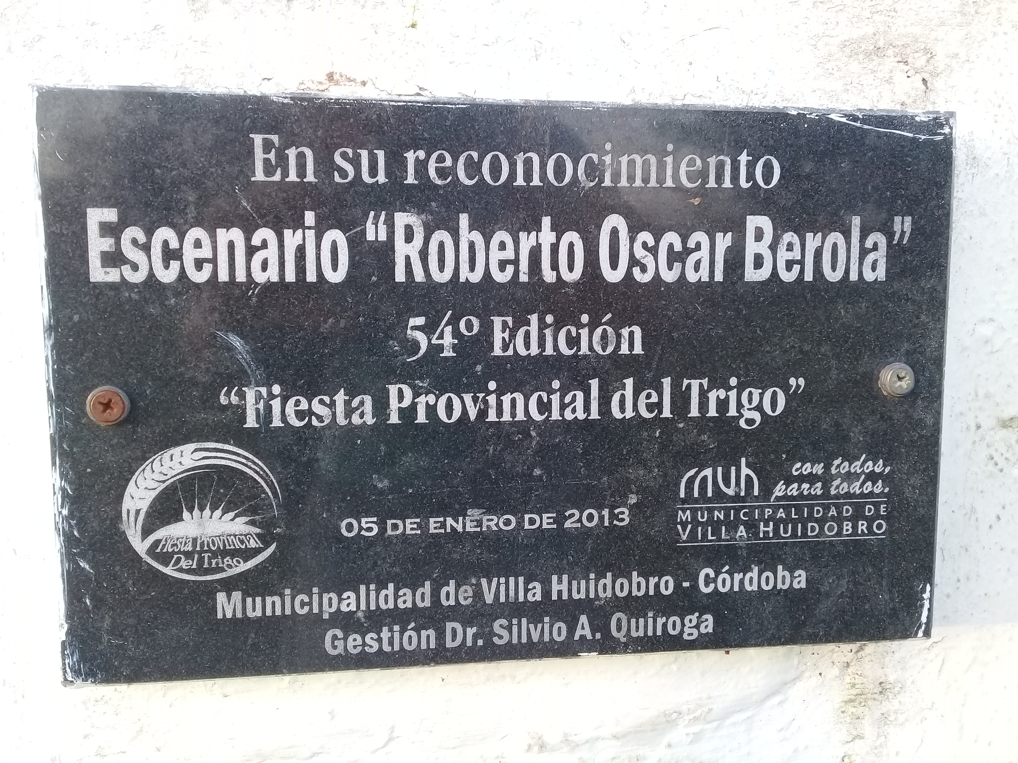 El 5 de enero del año 2013 se inaugura el escenario “Roberto Oscar Berola”, construido sobre la base de un antiguo galpón del ferrocarril. Con su nombre se rinde homenaje a un reconocido locutor local que durante tres décadas colaboró con la realización de la Fiesta. A partir de la 54° Fiesta Provincial del Trigo se utiliza este escenario.